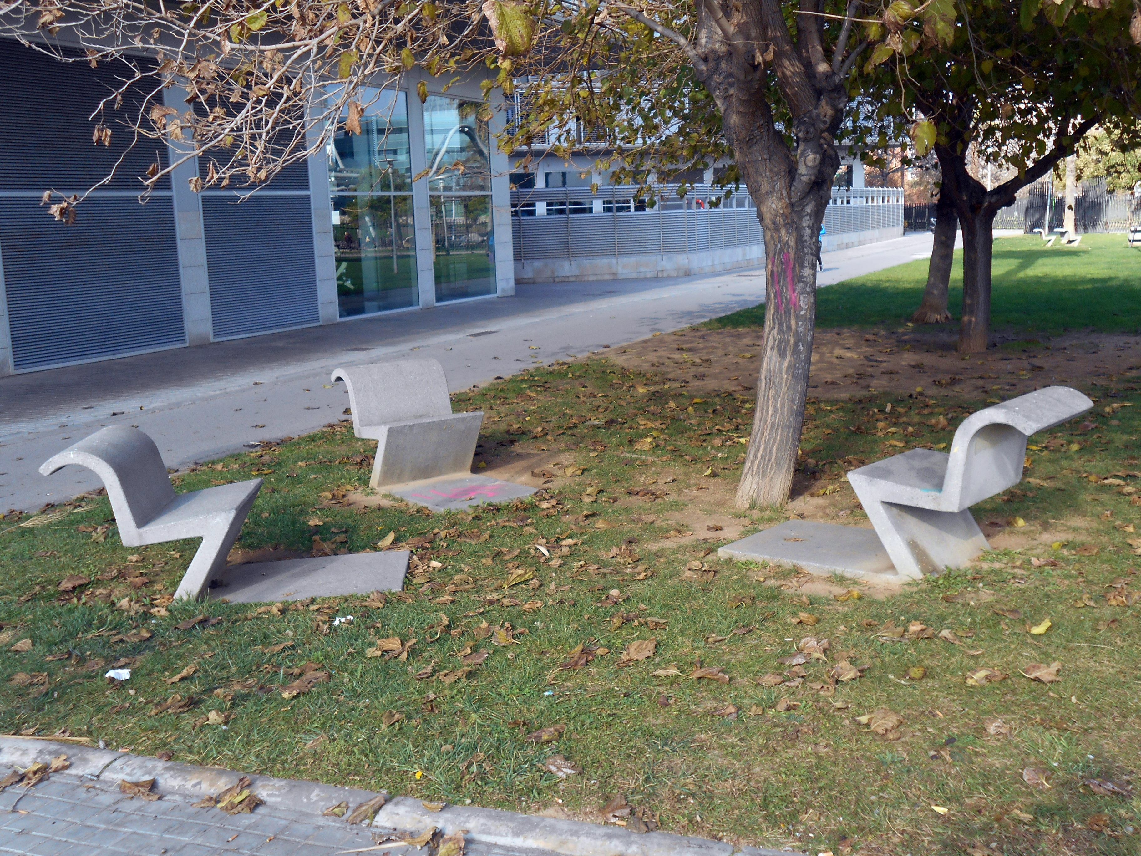 Bancos modelo U, de Albert Viaplana y Helio Piñón.